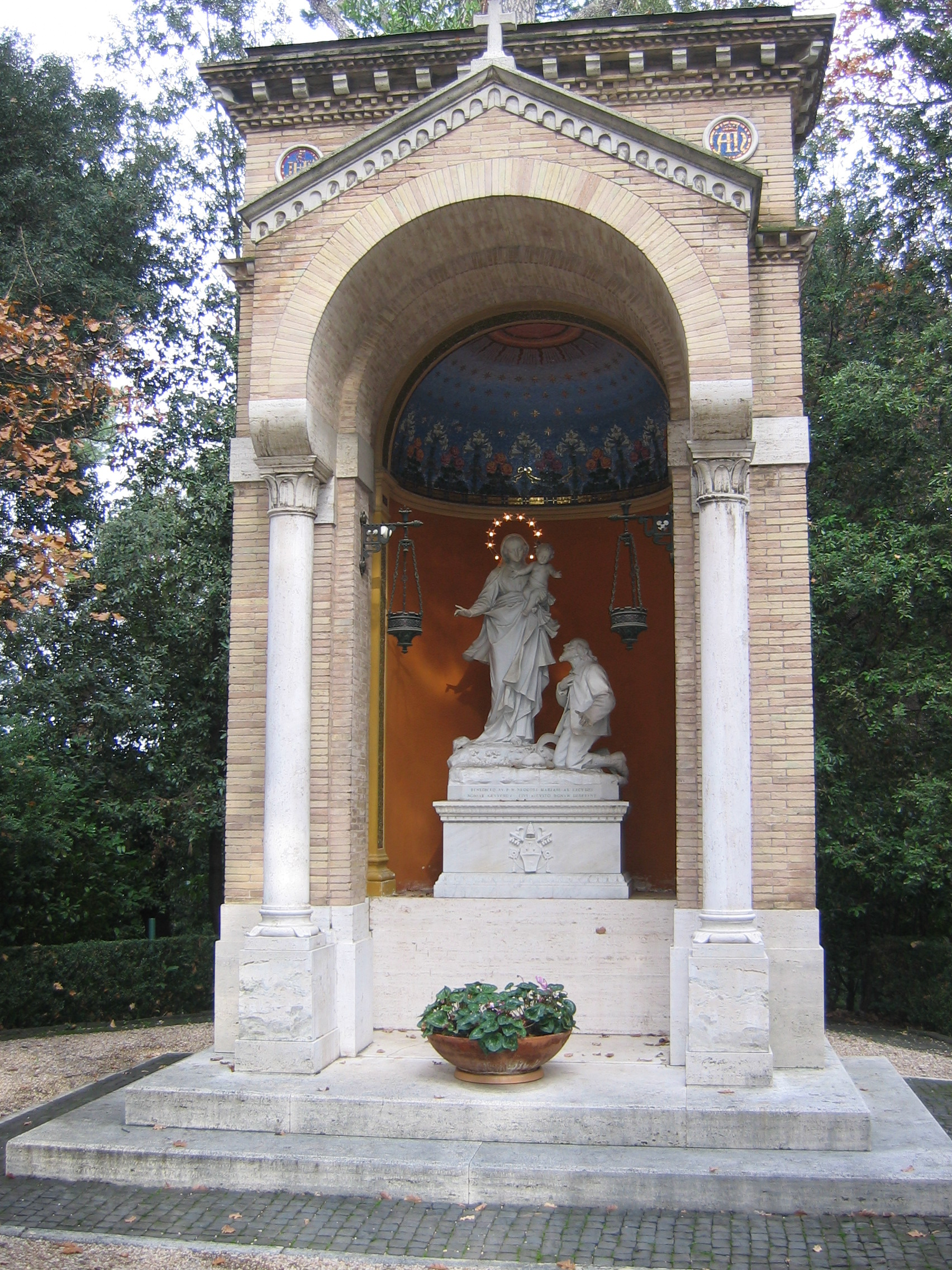 scattata dal sottoscritto don Paolo - dimmi che te ne pare 03:38, 17 mar 2006 (CET)